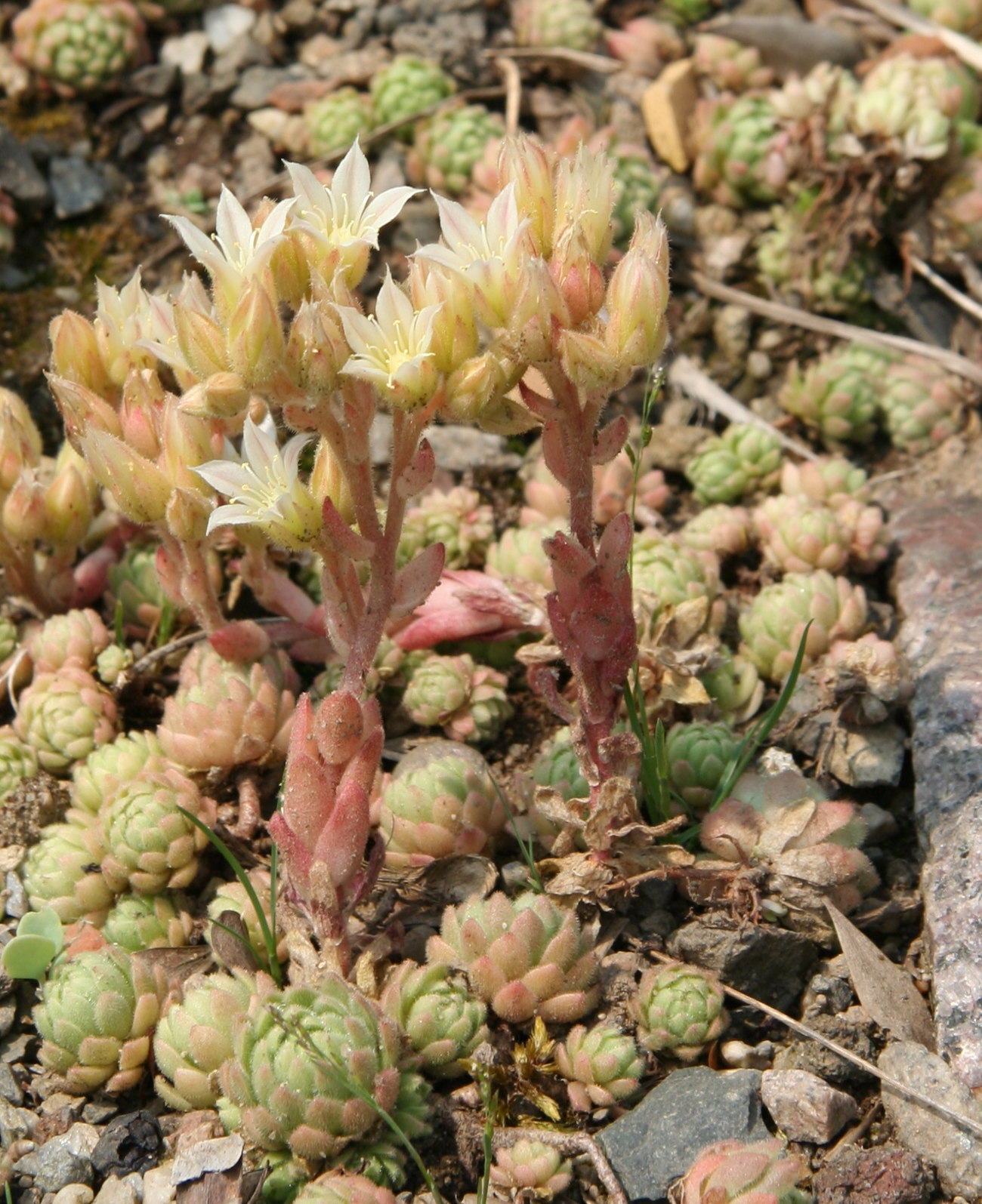 Prometheum chrysanthum im Botanischen Garten Dresden